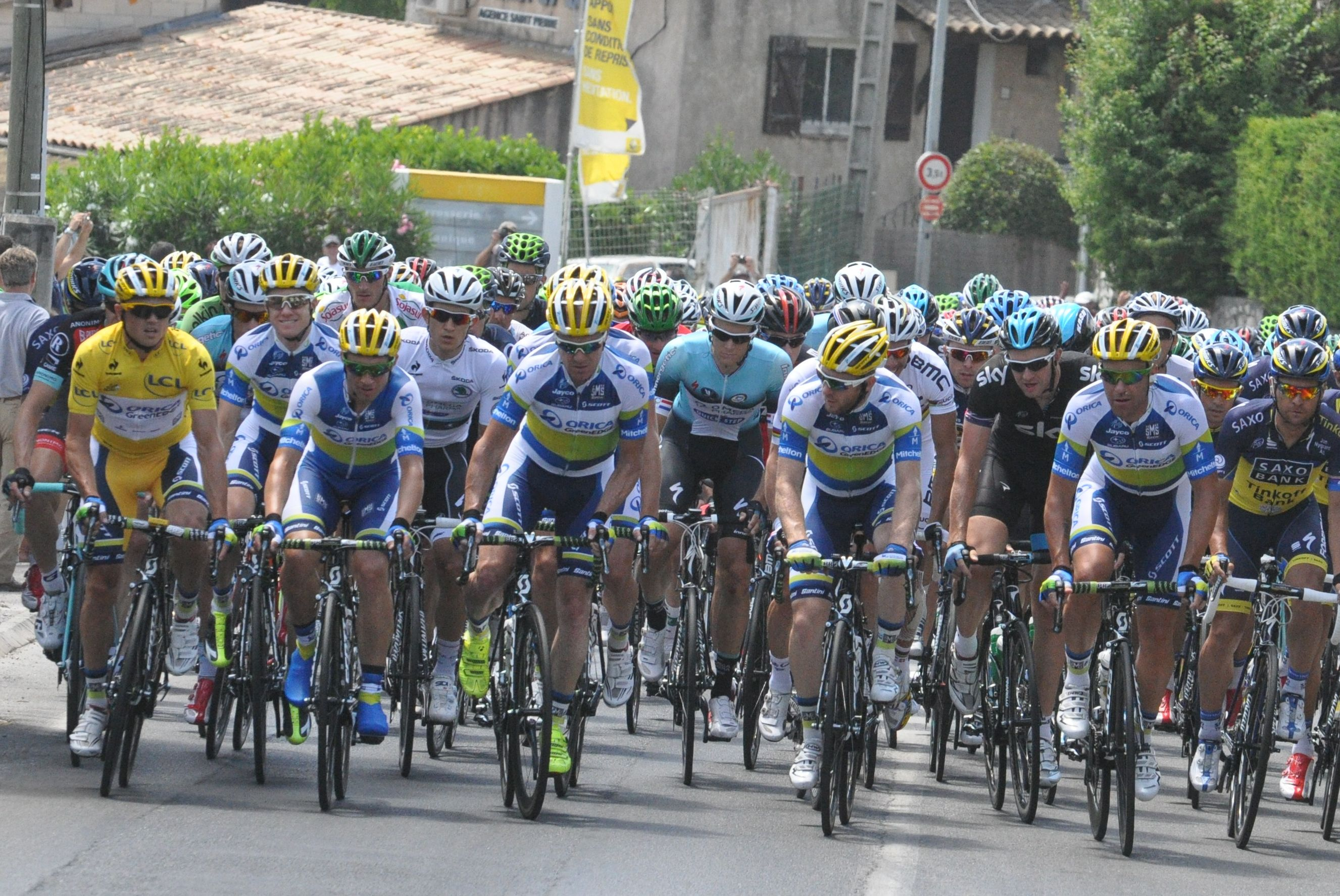 5ª etapa del Tour de Francia 2013. Orica GreenEDGE a la cabeza del pelotón